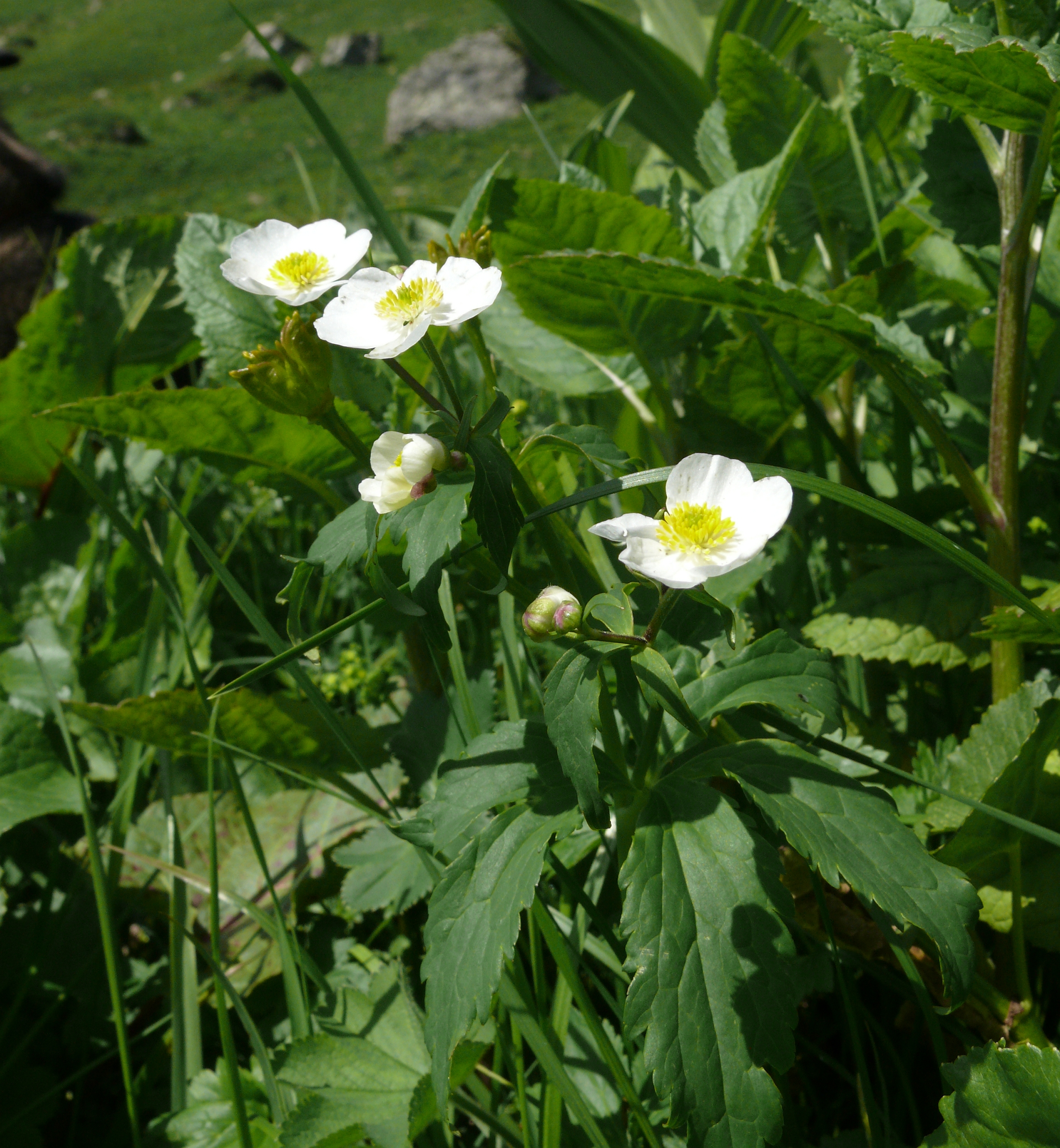 Ranunculus aconitifolius, Allgäuer Alpen, Deutschland